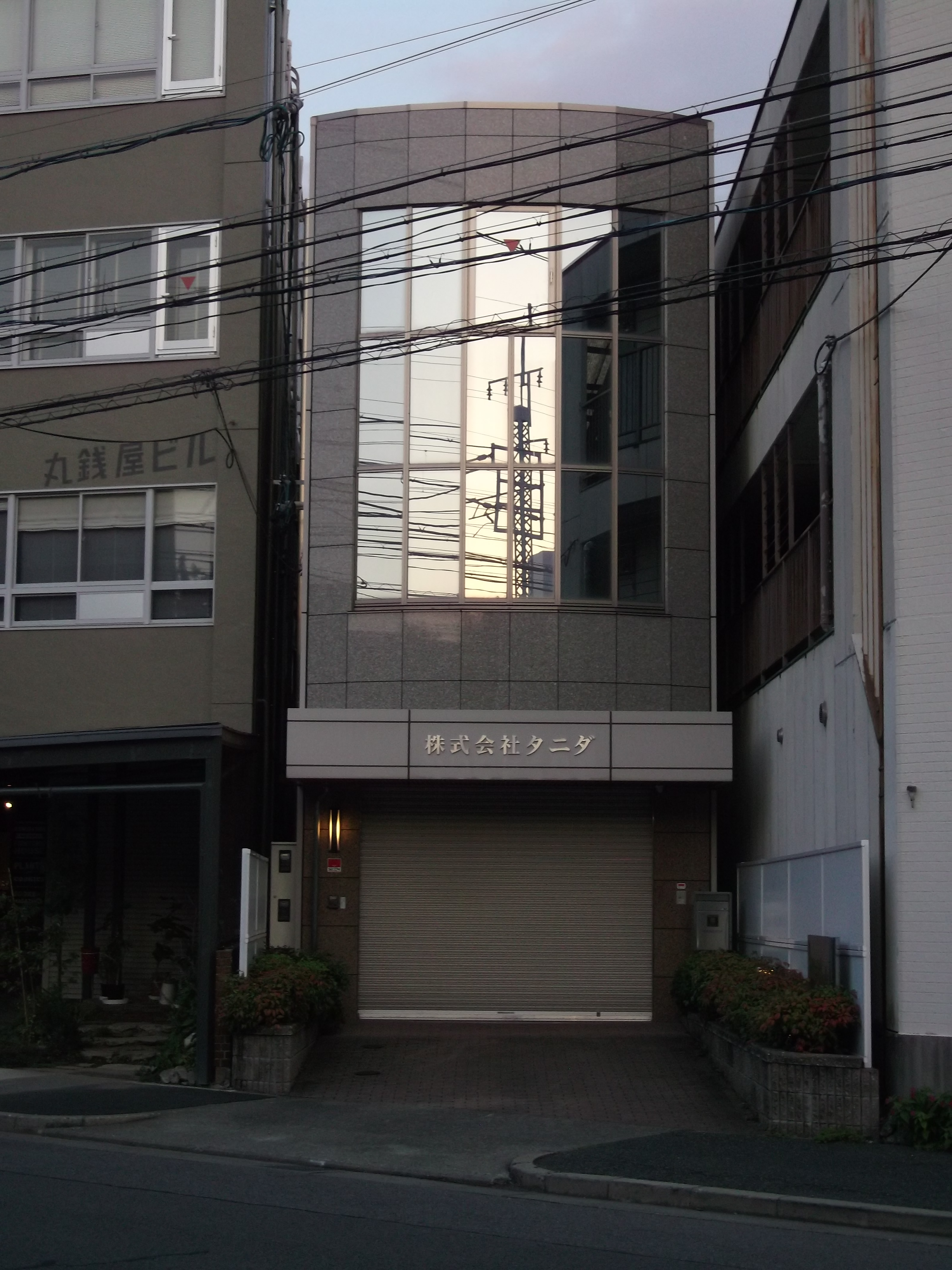 名古屋市昭和区鶴舞のタニダ本社を北西側公道より撮影